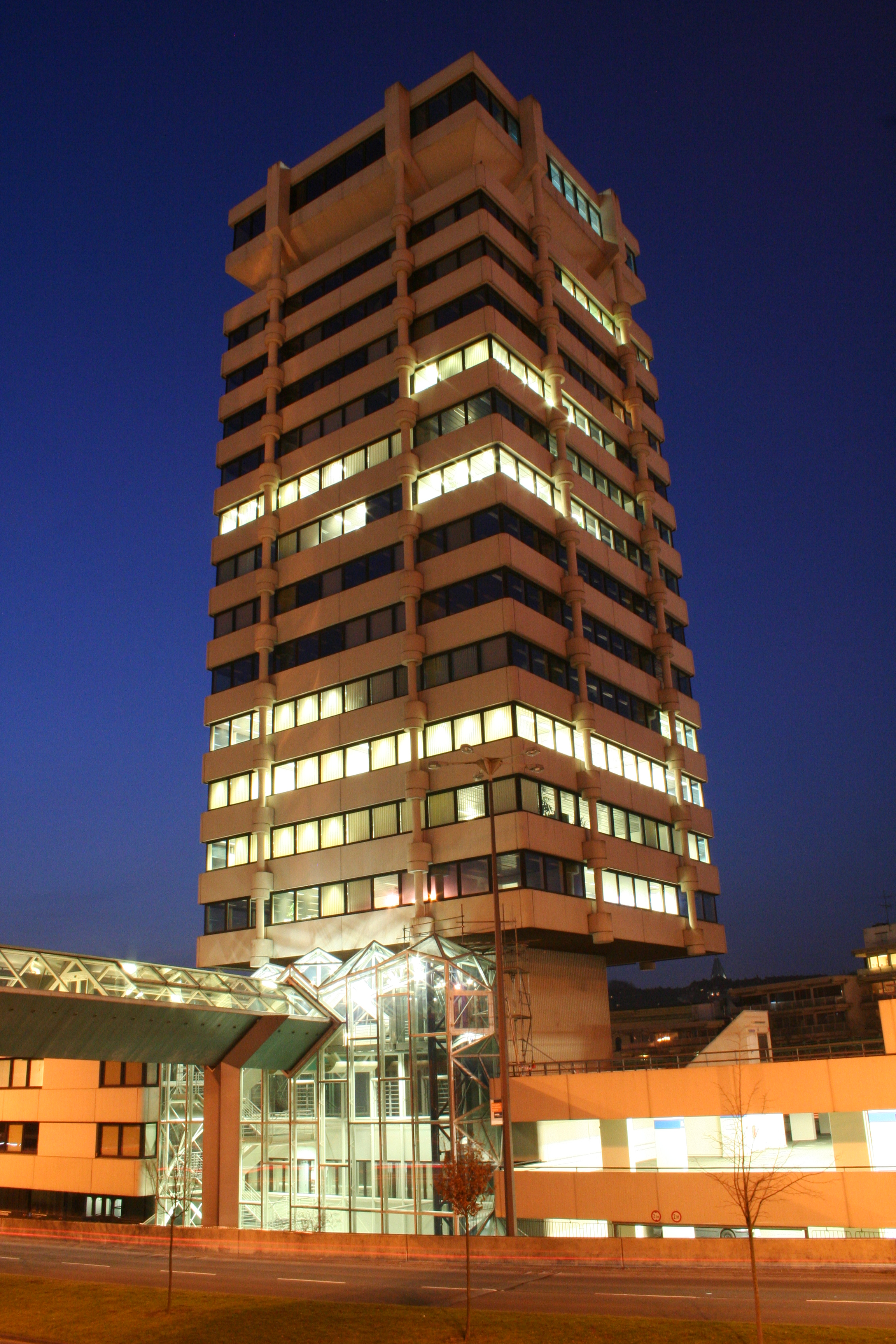 Beschreibung: Sparkasse in Wuppertal zur blauen Stunde Quelle: Selbst erstellt Datum: 24.Februar 2006/ 22.Februar 2007 Autor: Thomas Kathöfer